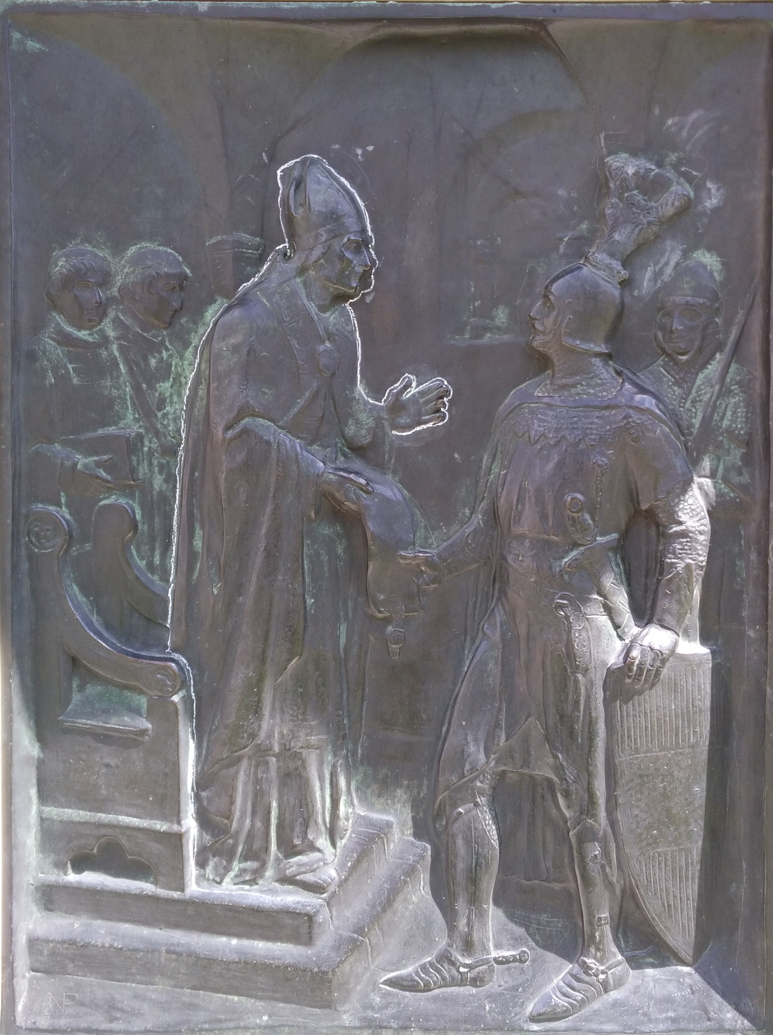 Fürstbischof Matthäus an der Gassen überträgt im Jahr 1363 in einer feierlichen Zeremonie dem Habsburger Rudolf IV. "dem Stifter" das Brixner Lehen. Bronzerelief des Bildhauers Norbert Pfretzschner (1850-1927) an der Jahrtausendsäule in Brixen / Bressanone, errichtet im Jahre 1909